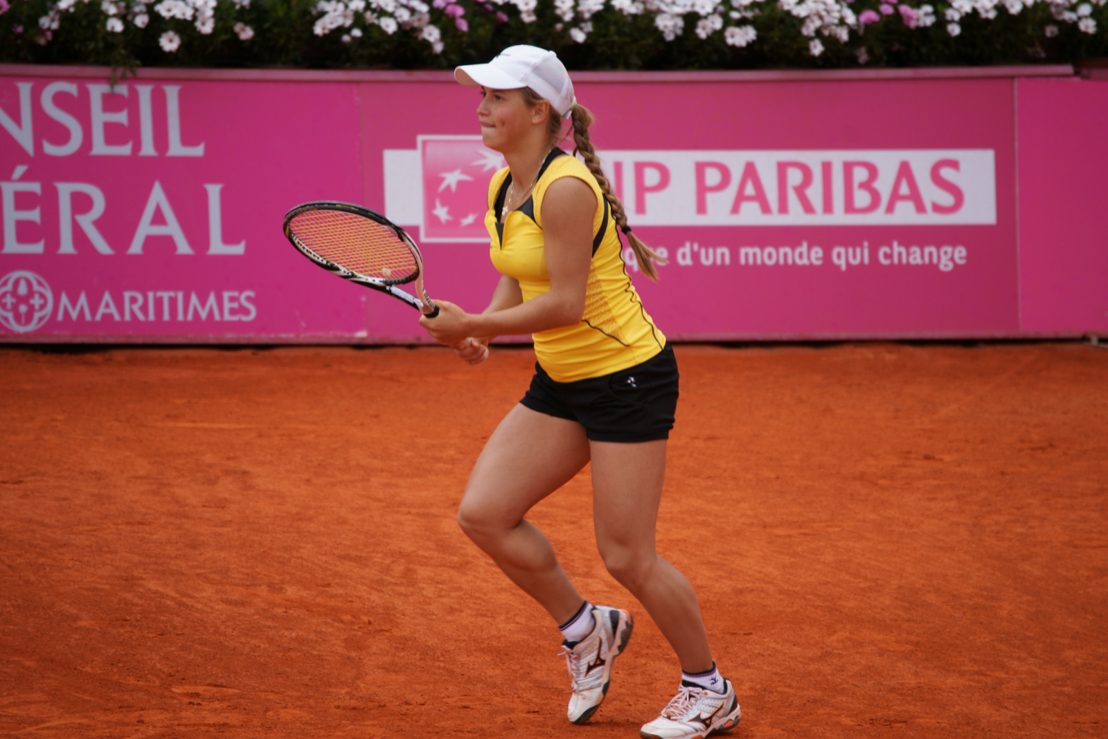 Yulia Putintseva, Open tennis Cagnes-sur-Mer 2012